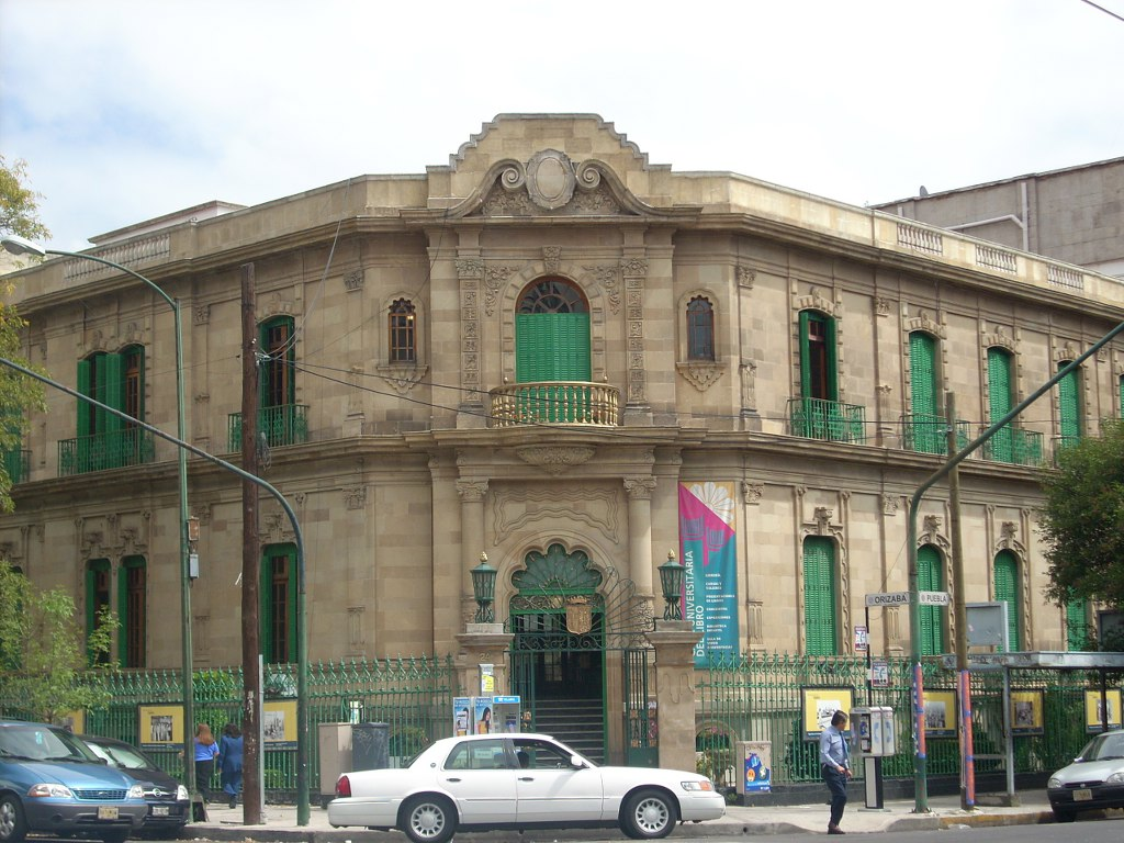 Casa Universitaria del Libro UNAM